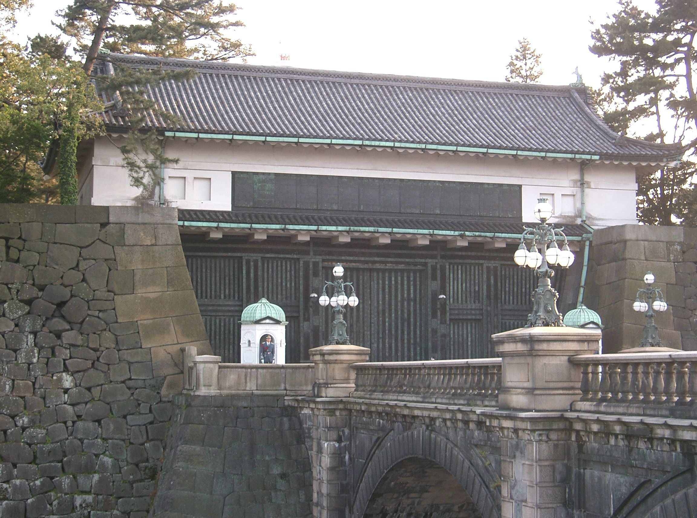 （皇居の）正門